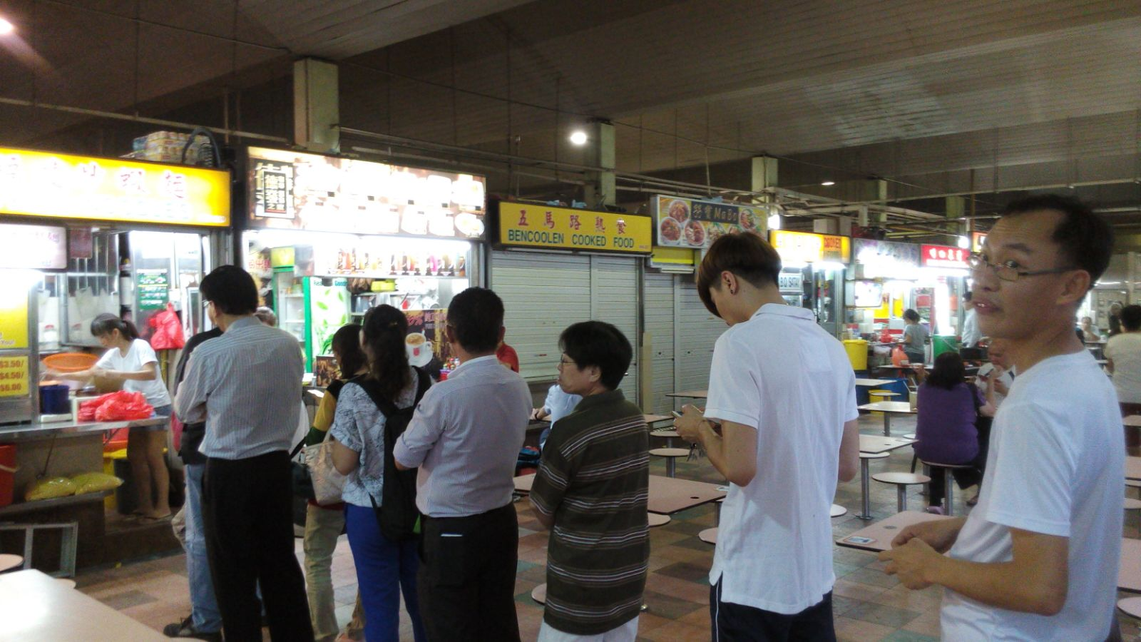 先进先出和后进先出排队法